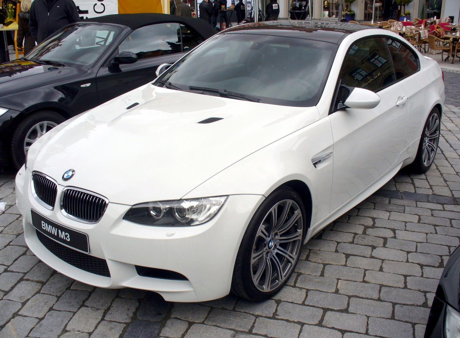 BMW E92 M3